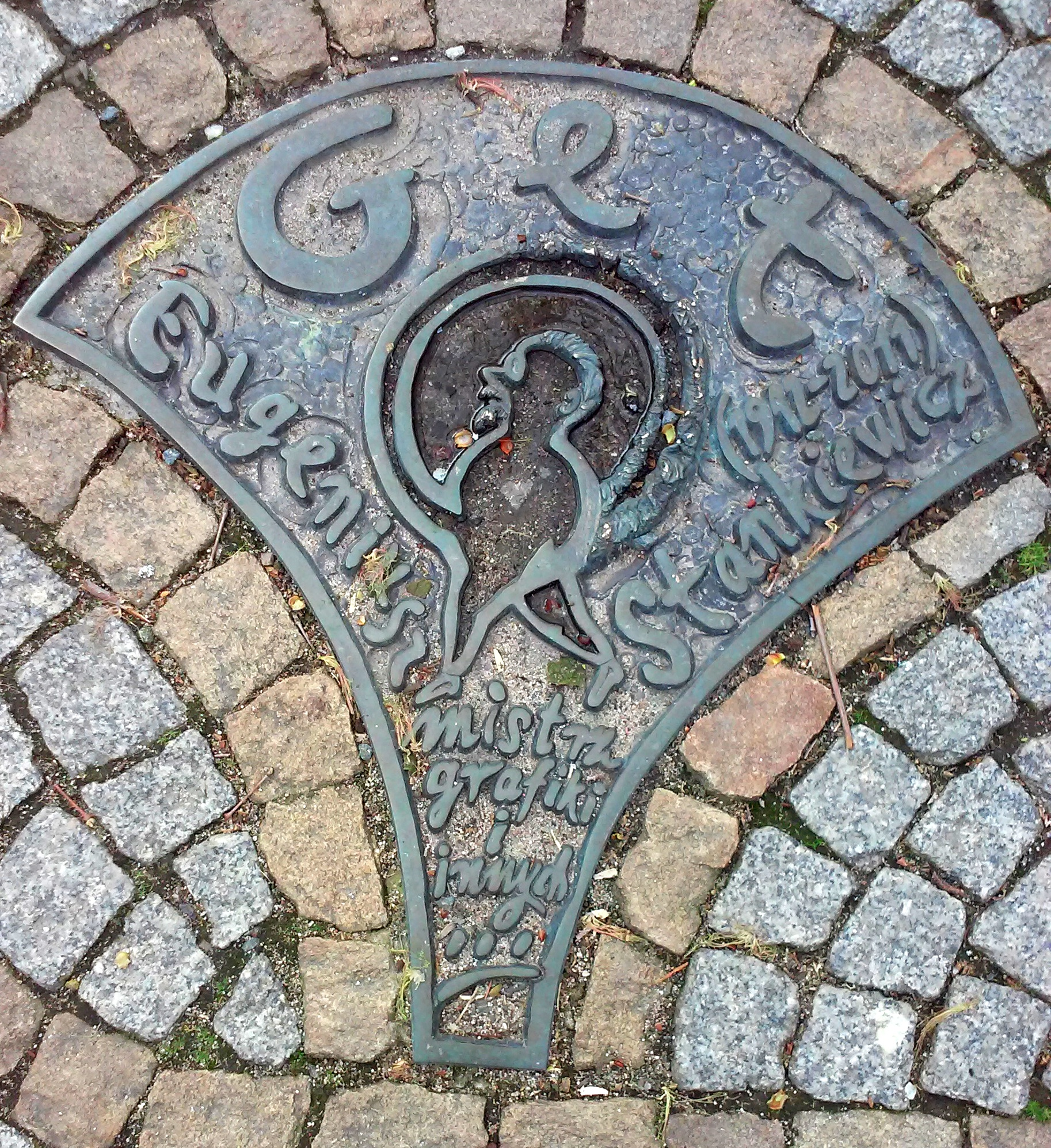 Legnica, Aleja Gwiazd Satyrykonu, tablica pamiątkowa - Eugeniusz Get-Stankiewicz